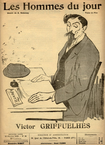 Victor Griffuelhes, né à Nérac (Lot-et-Garonne) le 14 mars 1874 et mort le 30 juin 1922 (à 48 ans) à Saclas (Seine-et-Oise), est un syndicaliste révolutionnaire et libertaire français.- Les Hommes du jour, n° 56, 13 février 1909. Dessin d'Aristide Delannoy, texte de Flax.